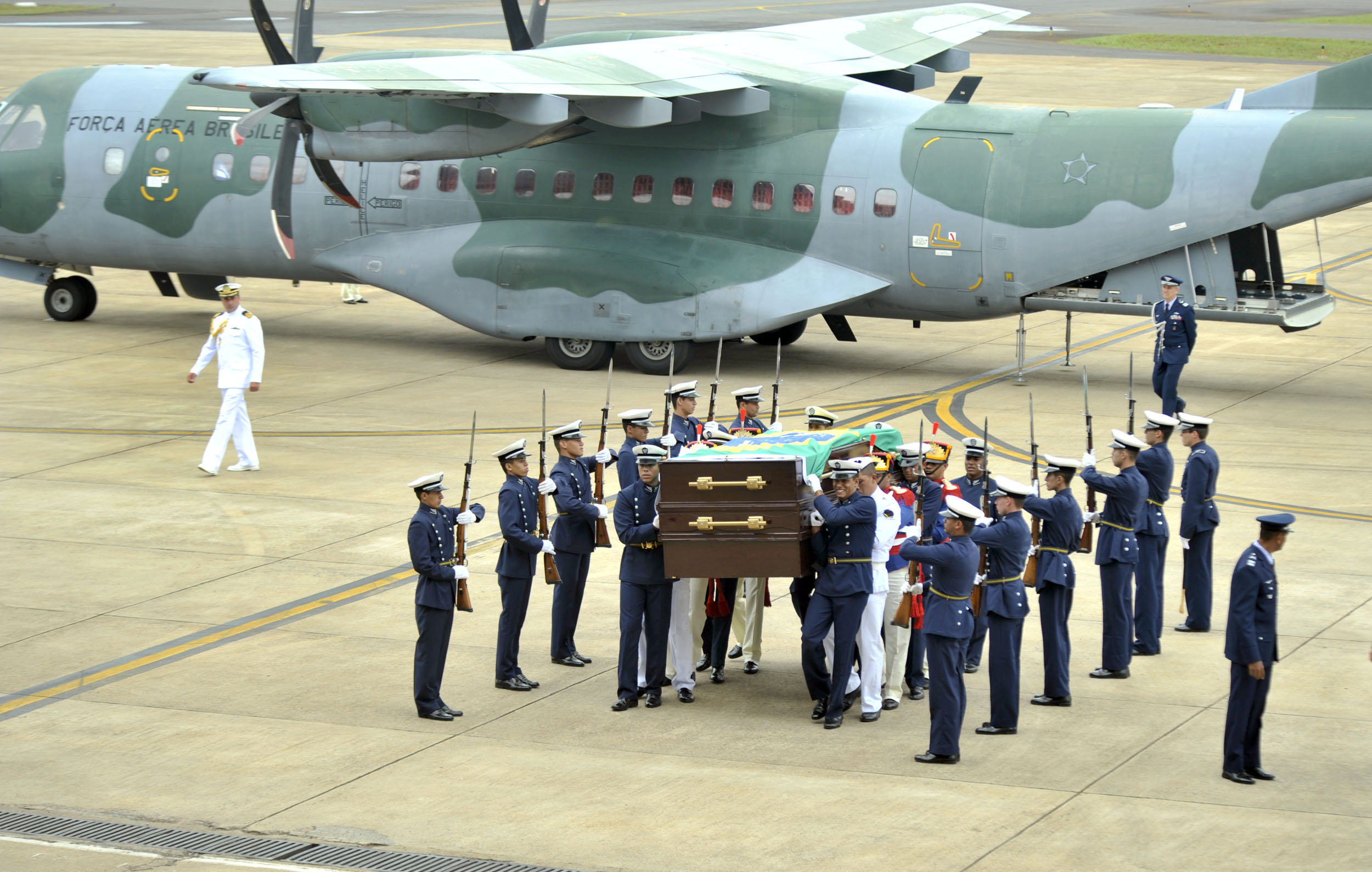 14/11/2013, Brasília - DF Fotos: Tereza Sobreira/MD